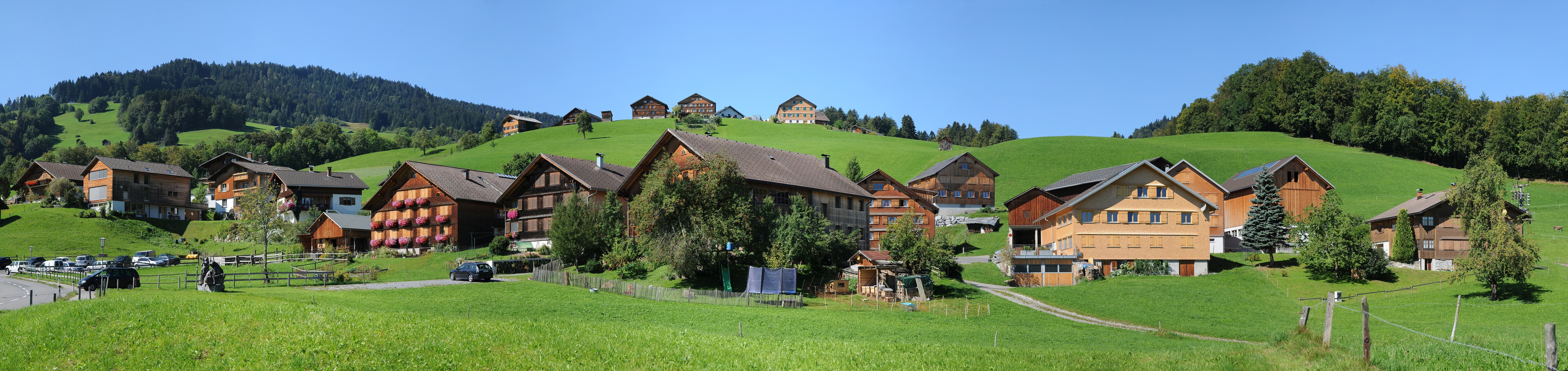 Panorama vom Ortsteil “Freien” auf die Parzelle “Beien” am Schwarzenberg (Vorarlberg) .